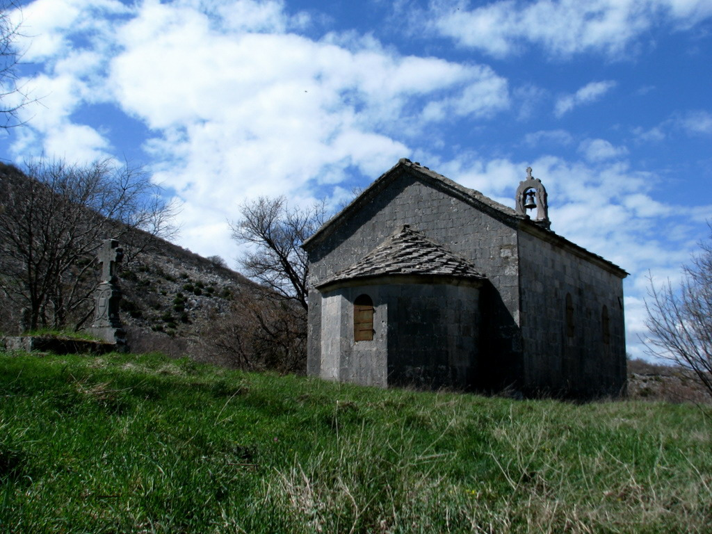 Crkva Vasilija Ostroskog